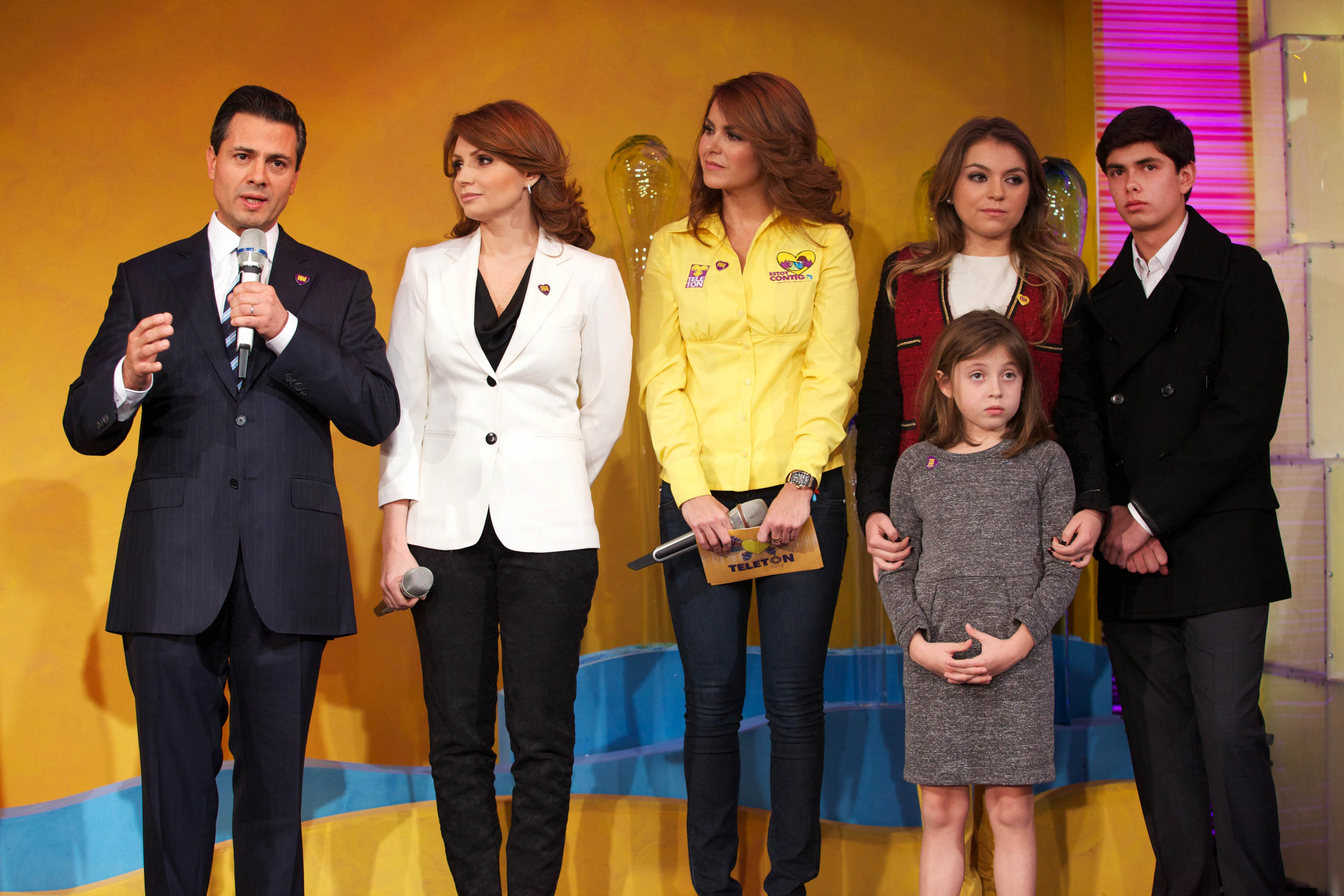 Teletón 2012. Televisa San Ángel. México, D.F. 7 de diciembre del 2012.